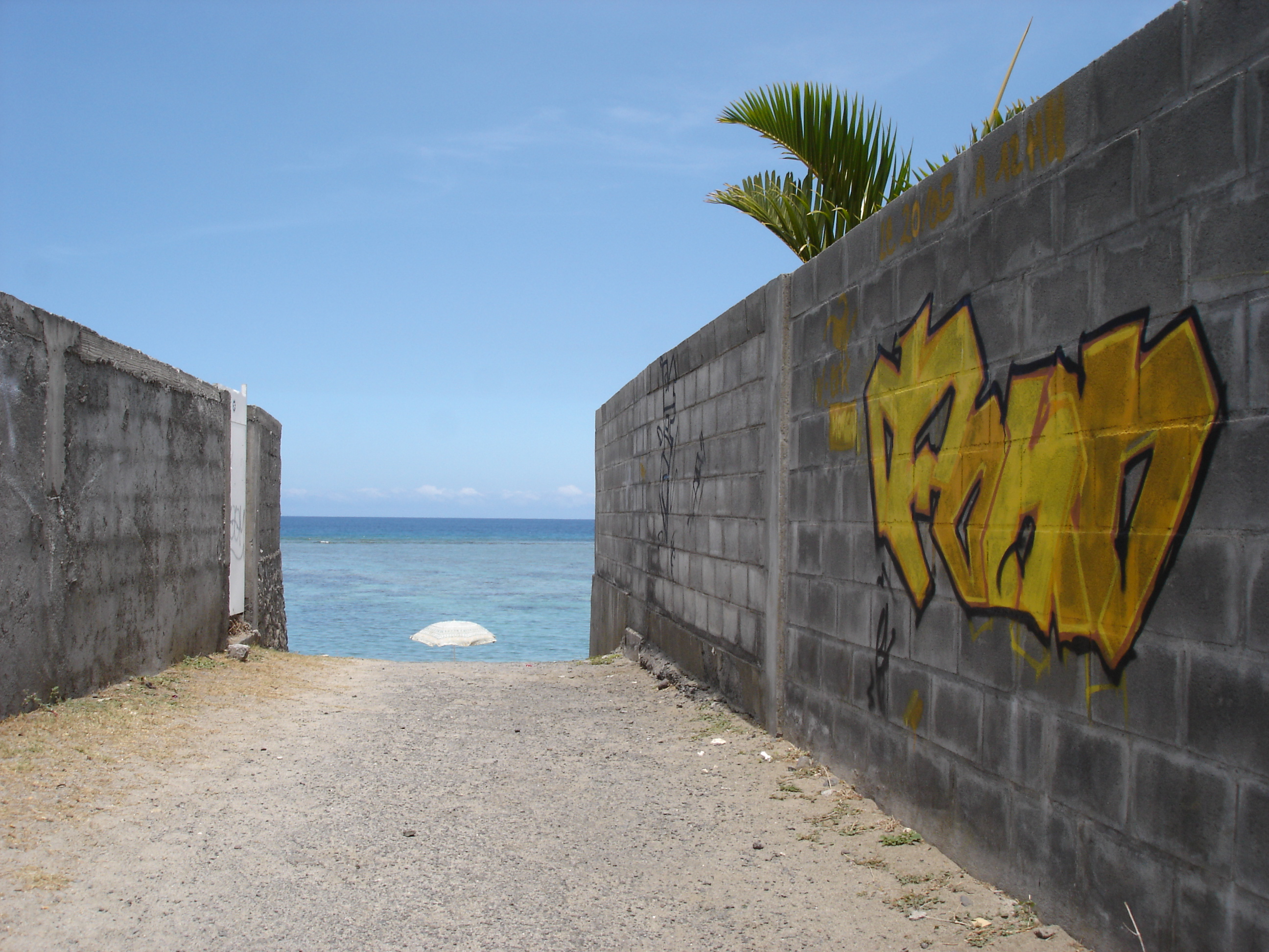 Description: Un accès à la plage, novembre 2004, Saint-Leu, La Réunion Source: Bouba